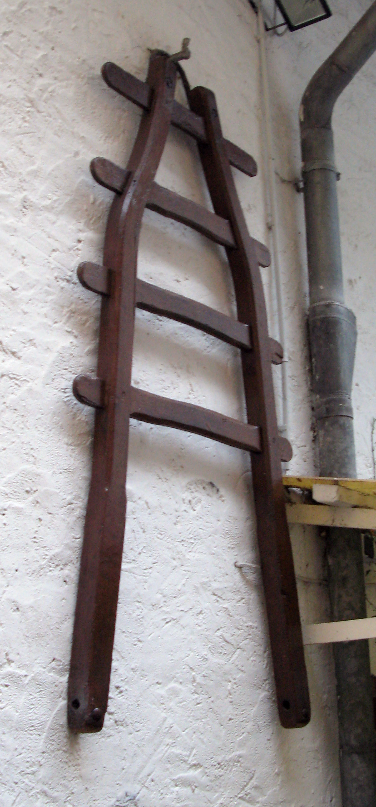 En Heegeck. Eege Foto vum mat frëndlecher Erlabnes vum Här Neuens aus der Buerg.